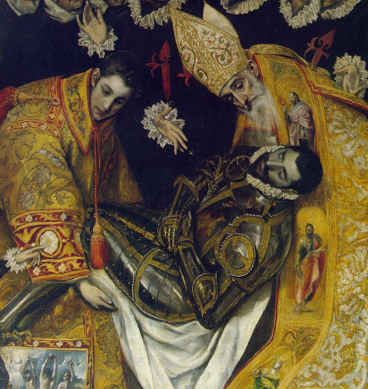 El entierro del señor de Orgaz, más conocido como El entierro del conde de Orgaz, es un óleo sobre lienzo pintado en estilo manierista por El Greco entre los años 1586 y 1588. Fue realizado para la iglesia de Santo Tomé de Toledo, (España), donde aun permanece, y es considerada una de las las mejores obras de su autor. El cuadro representa el milagro en el que, según la tradición, San Esteban y San Agustín de Hipona bajaron del Cielo para enterrar personalmente a Gonzalo Ruiz de Toledo, señor de la villa de Orgaz y fallecido en 1323, en la iglesia de Santo Tomé, como premio por su vida ejemplar de devoción, humildad y obras de caridad. El Greco aceptó el encargo de realizar la obra en 1586, algo más de dos siglos y medio después de los hechos que en ella representó.